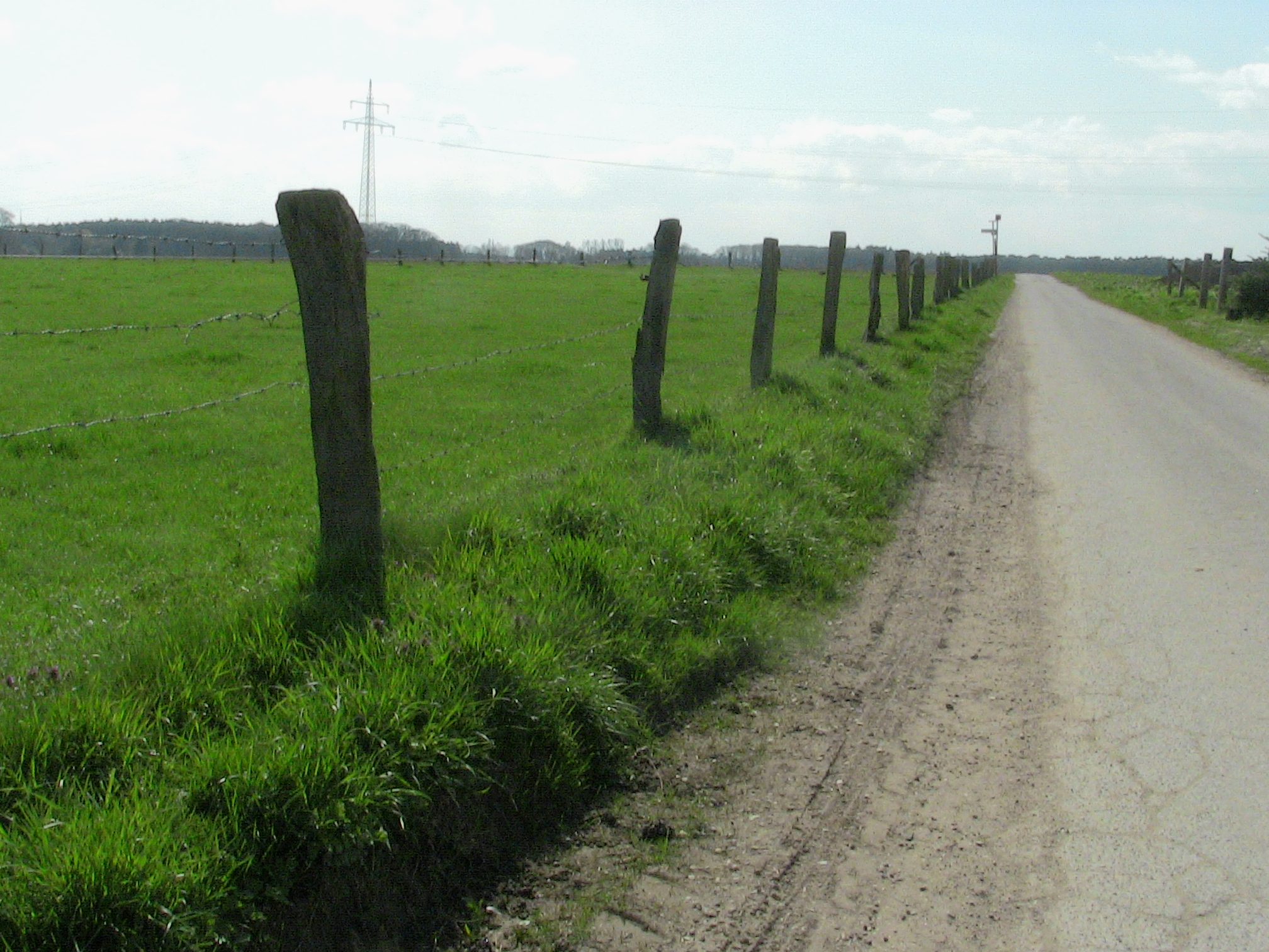 Der Merbecker Feldweg